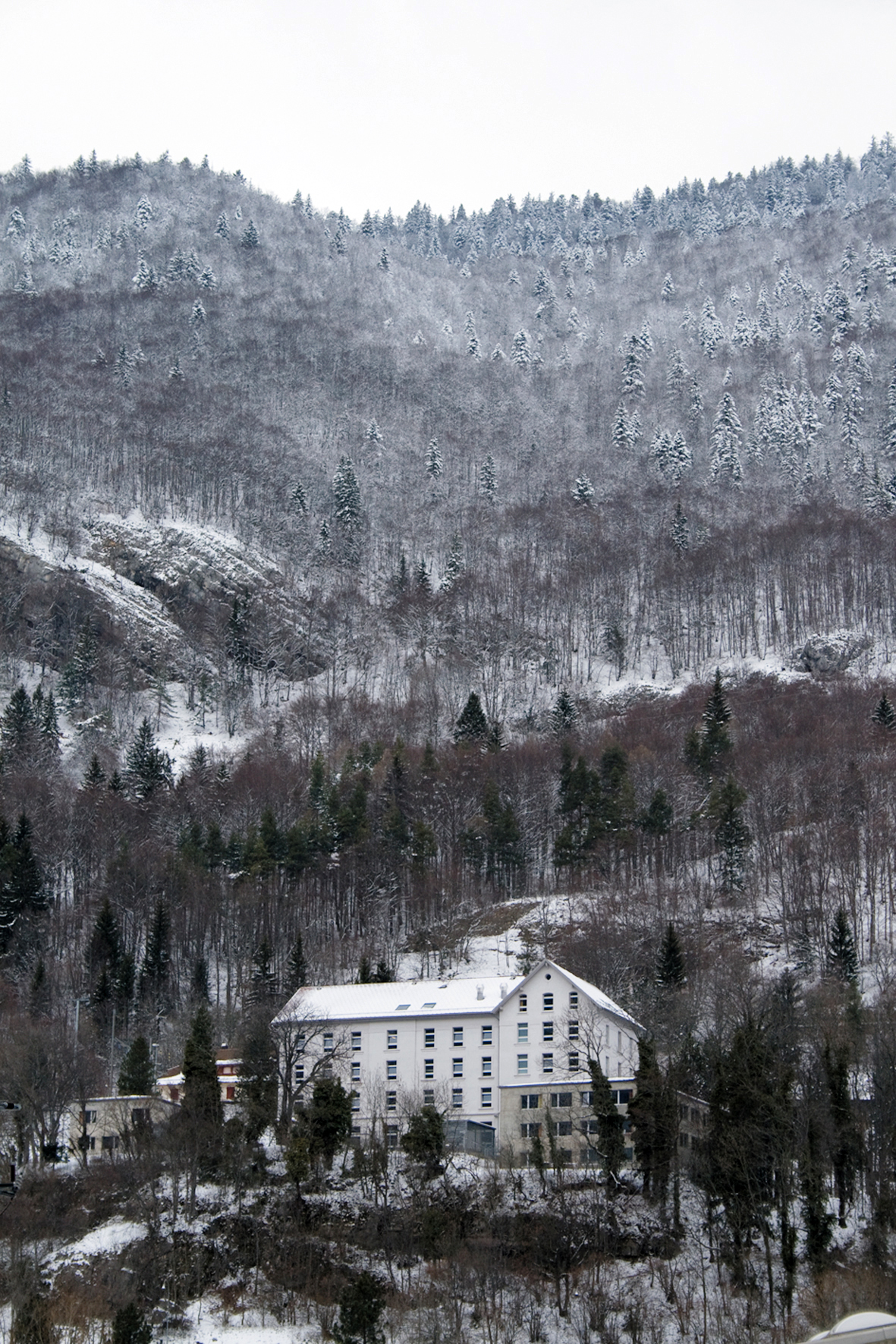 Le centre d’enregistrement et de procédure pour requérant d’asile de Vallorbe. Image tirée du film « La forteresse » de Fernand Melgar